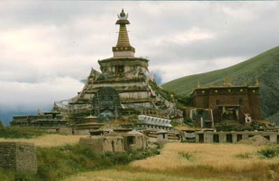 Tsoniang Chörten des Samdrub-Klosters (Sangzhou Si) im Kreis Yushu